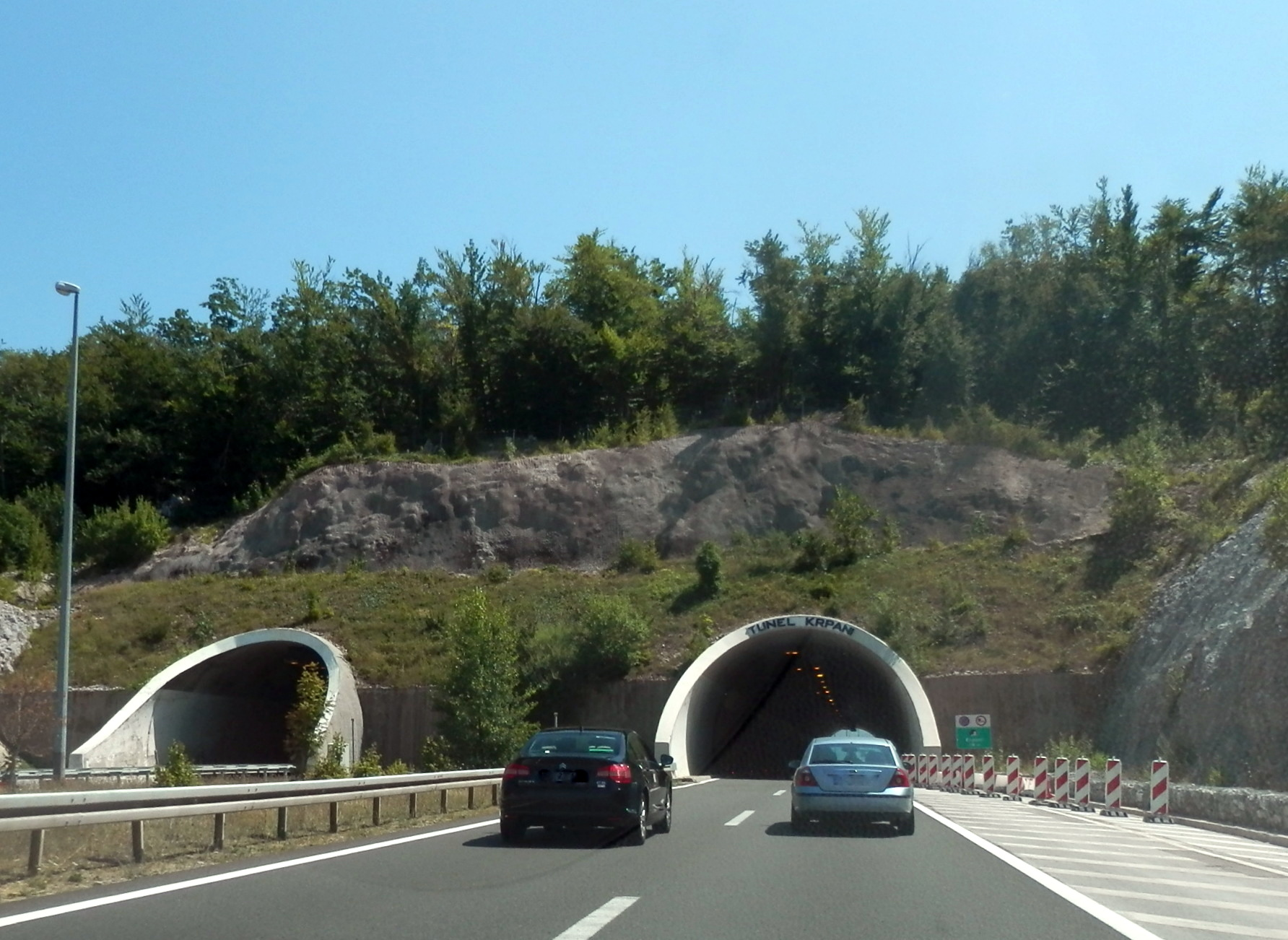 "Krpani" Tunell. Diaľnica A1 v Chorvátsku. Leto 2013